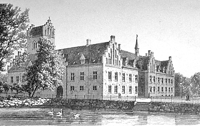 Herlufholm ved Næstved. Var oprindelig et Benediktinerkloster og hed Skovkloster; ved Reformationen kom det ind under Kronen, som i Aaret 1560 mageskiftede det til Herluf Trolle mod Hillerødsholm. Herluf Trolle og hans Hustru omdannede derefter i 1565 Klosteret til en lærd Skole og Opdragelsesanstalt og kaldte denne Herlufsholm.